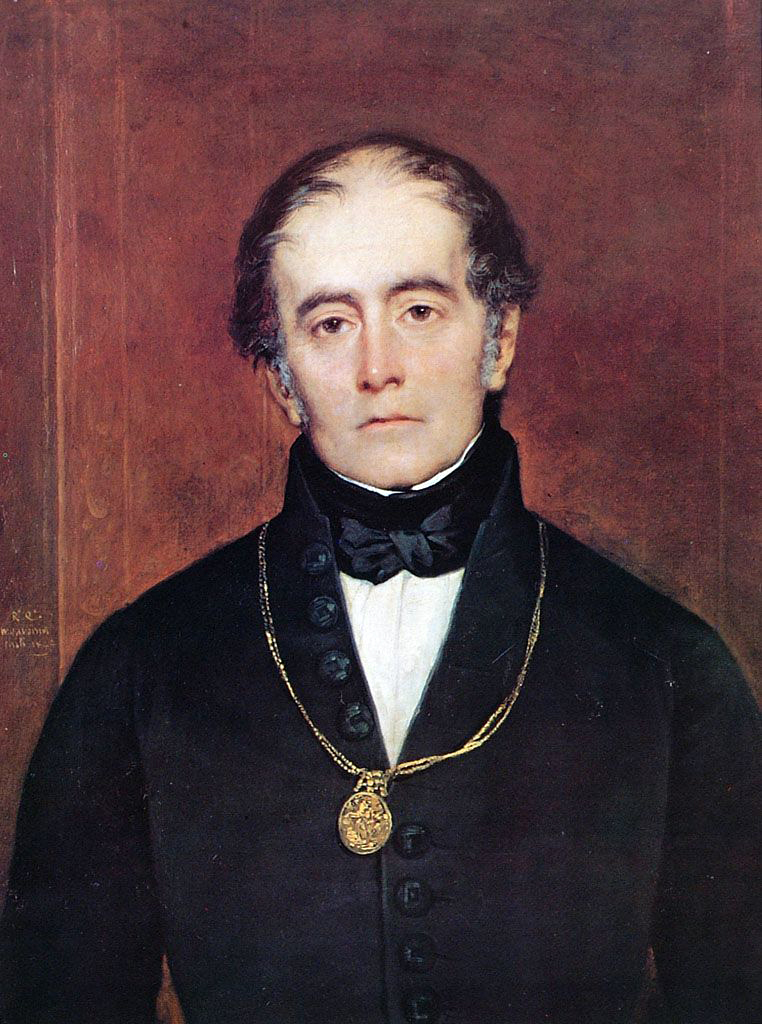 Retrato del venezolano Andrés Bello realizado en Chile, país donde vivió desde 1829 (se le concedió la nacionalidad chilena en 1832) hasta su muerte, acaecida en 1865